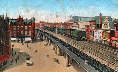 Het spoorwegviaduct over de Binnenrotte in Rotterdam. Foto van prentbriefkaart uit 1910, fotograaf anoniem Railway viaduct, Rotterdam, 1910